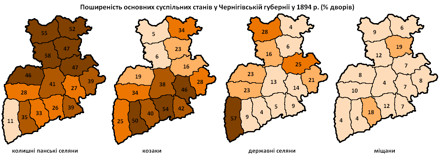 Поширення основних суспільних станів Чернігівської губернії у 1894 р. (у % від загальної кількості дворів)